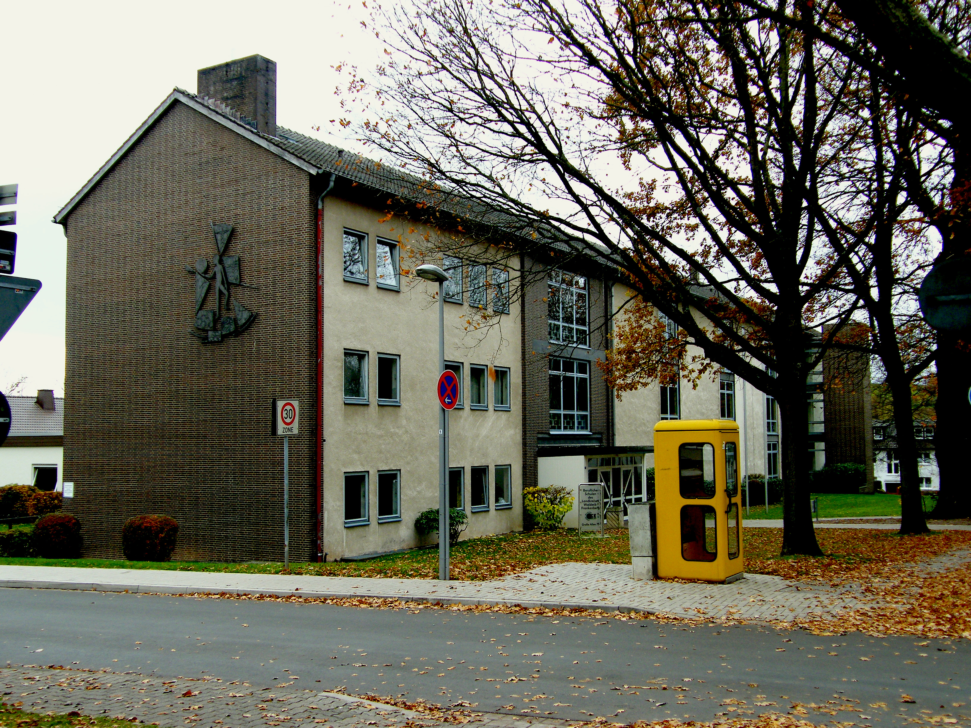 Berufliche Schulen Korbach und Bad Arolsen - Schulstandort: Bad Arolsen, Große Allee 75